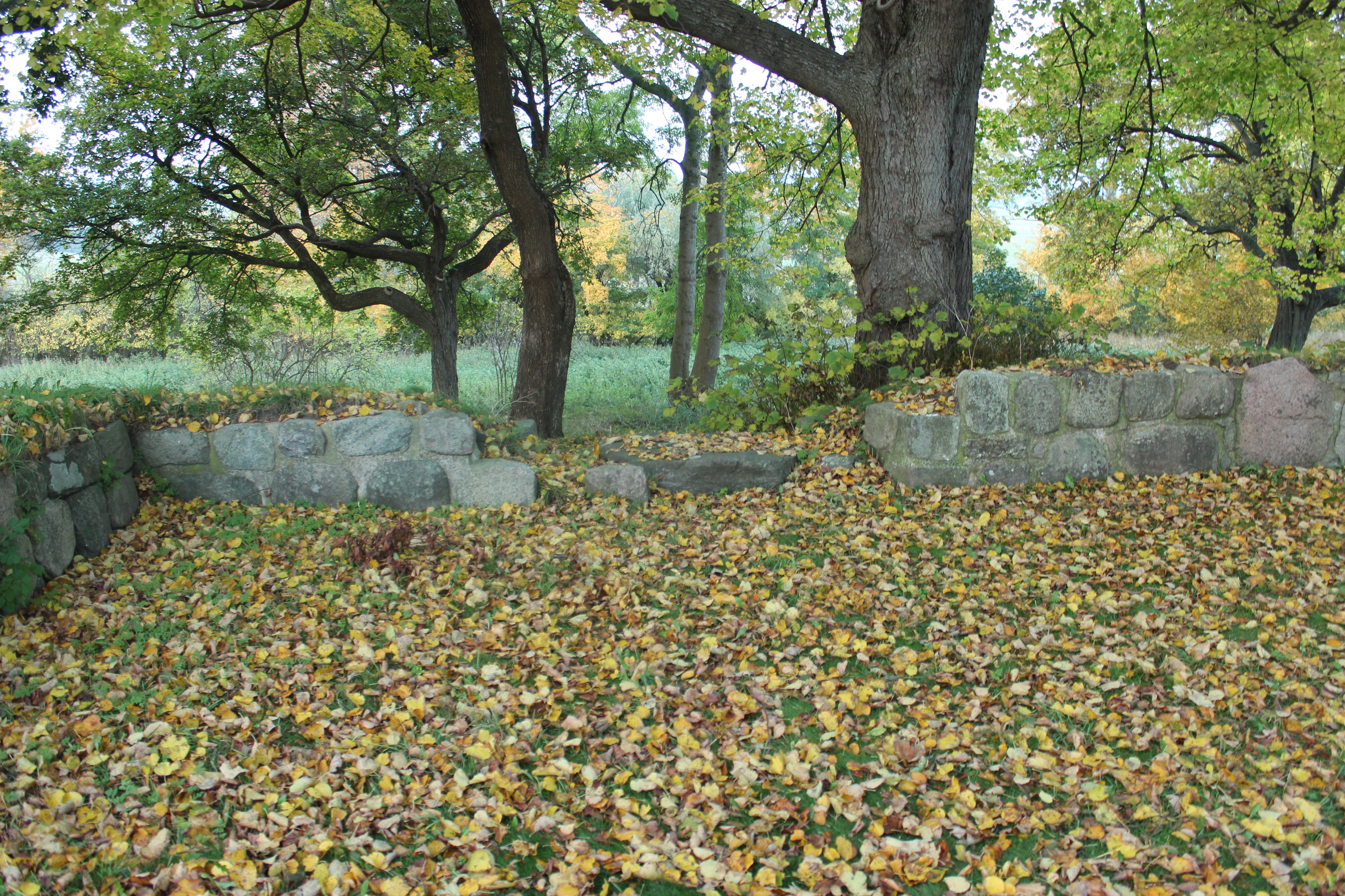 Den ene af de to døre (mod nord)